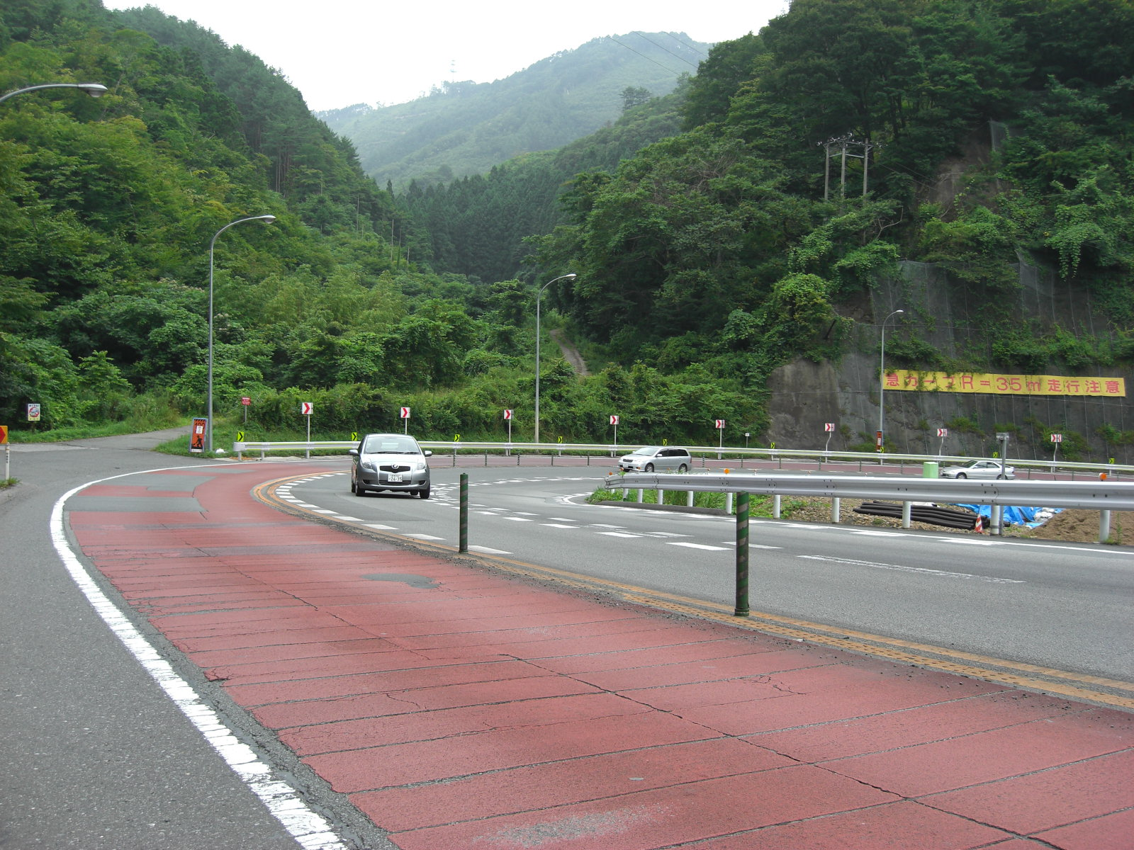 只越峠からのヘアピンカーブ